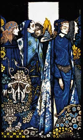 Etain, Helen, Maeve and Fand, Golden Deirdre's Tender Hand